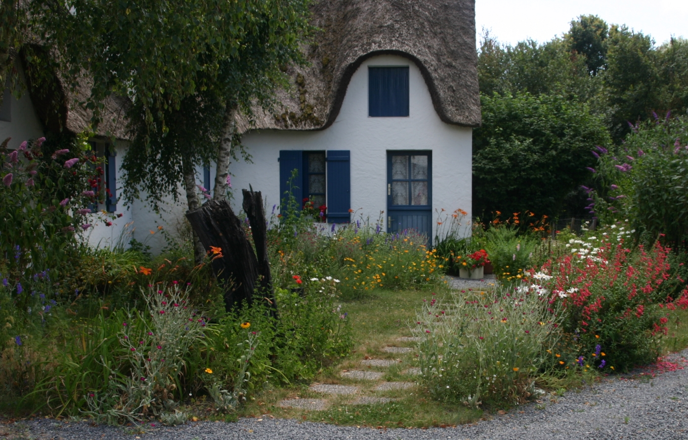 An almost natural garden, taken at île de Fédrun, in Saint-Joachim (Loire-Atlantique, Pays de la Loire, France).